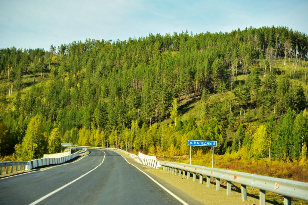 Р258 «Байка́л»